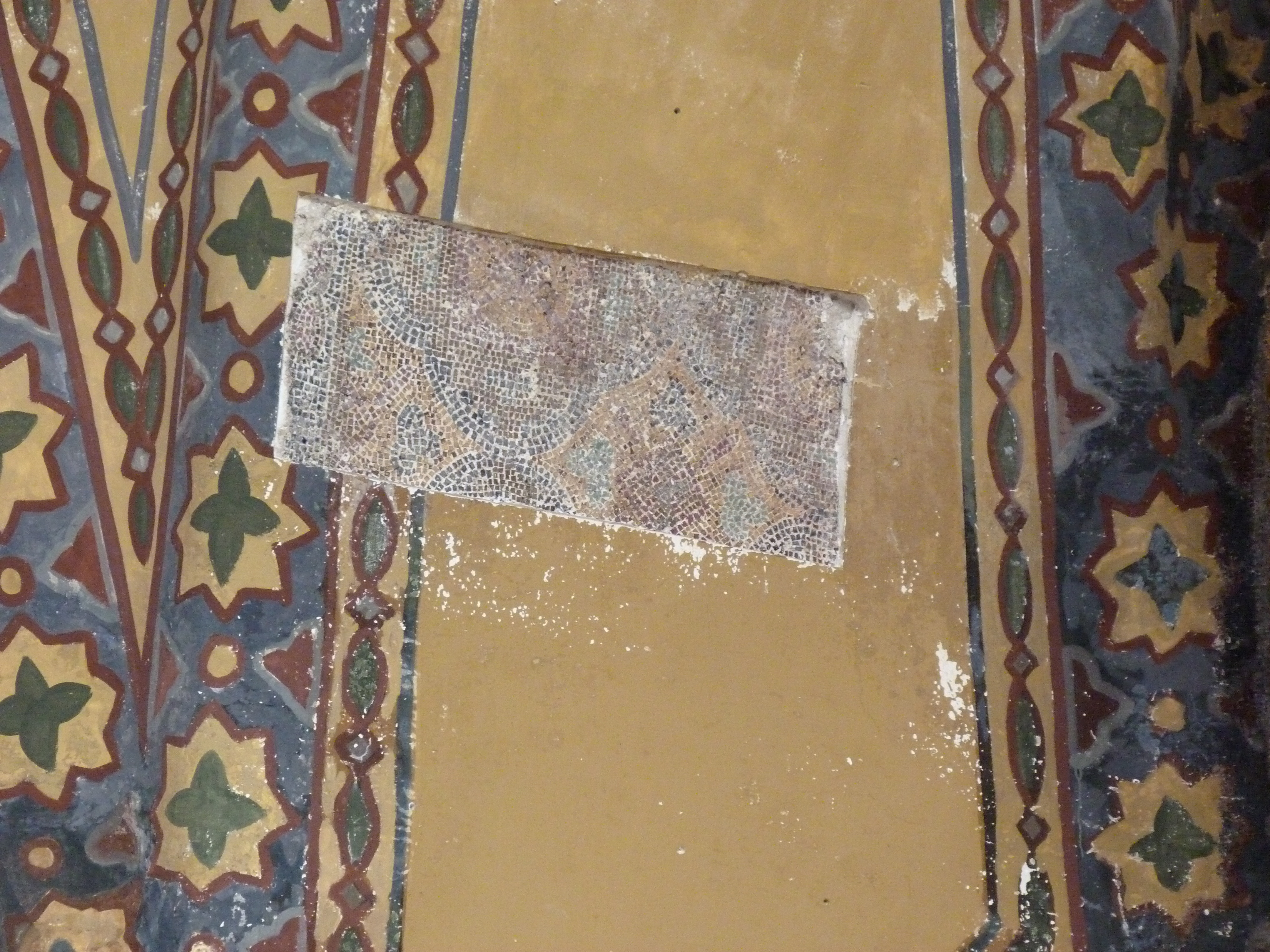 A felvétel 2014. október 23-án készült. Törökország, Isztambul. Hagia Szophia. Az isteni bölcsesség temploma. Az 563 december 24-én felszentelt keresztény templom mintegy ezer évig a Konstantinápolyi Patriarchátus székhelye, a Bizánci Birodalom szellemi központja. Az imafülke két oldalán hatalmas bronz gyertyatartók állnak, amelyeket Nagy Szulejmán (I.) (a „Törvényhozó”, Kánuni) 1526-ban Buda első török megszállásakor a budai várból Konstantinápolyba szállíttatott. Ezek a gyertyatartók több mint 450 éve ugyanazon a helyen állnak, ahova I. Szulejmán annak idején állíttatta őket. ©© Derzsi Elekes Andor, Budapest, 2014, A kép egészben, vagy részletekben másolását, bármilyen úton történő sokszorosítását és felhasználását a szerző ellenérték nélkül, jogutódjaira is kihatóan megengedi. Az engedély kiterjed a kereskedelmi célú hasznosításra is. Kéri azonban nevének feltüntetését a felhasználás során. A Metapolisz sorozat valamennyi képe és filmje Creative Commons alatti valamint kereskedelmi - for profit - célra is felhasználható. Ajánlott hivatkozás: Derzsi Elekes Andor: Metapolisz DVD line